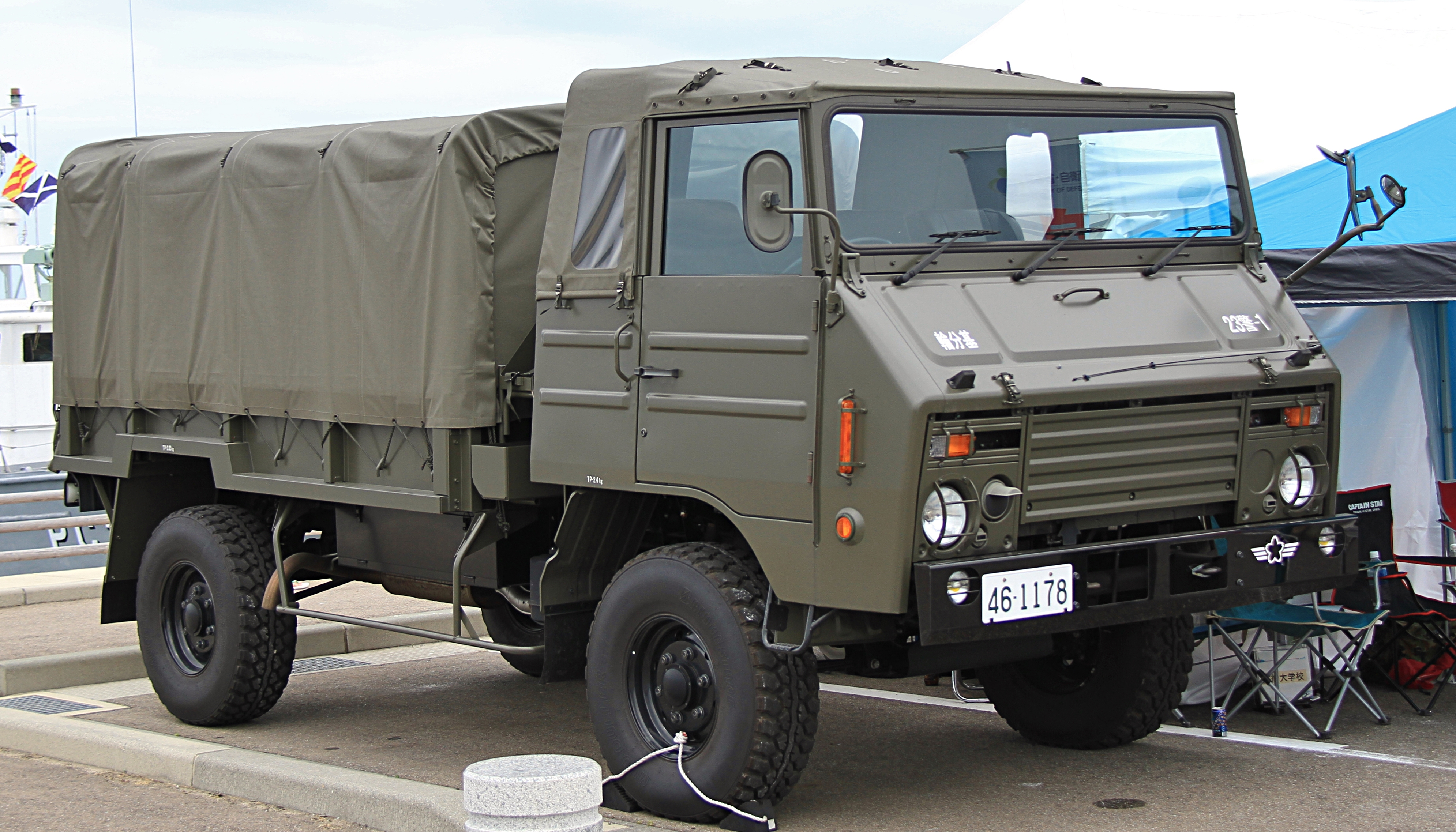 Type 73 chugata truck